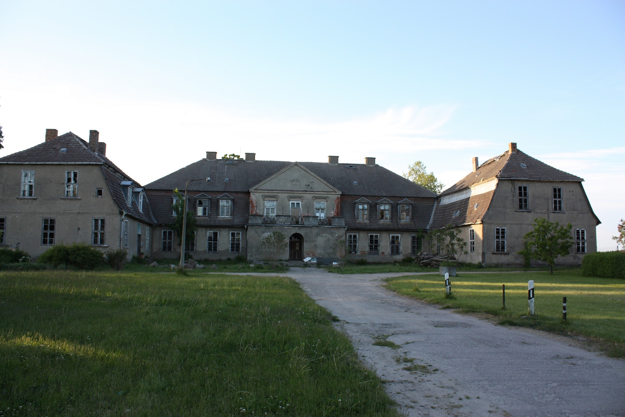 Ganzkower Gutshaus